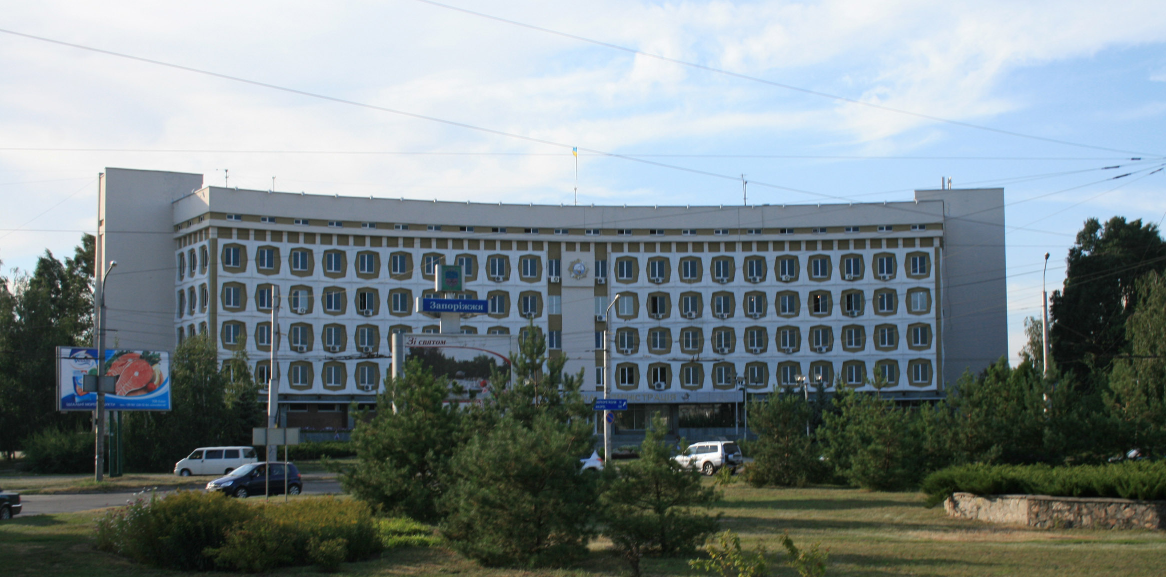 Здание администрации Ленинского района города Запорожье.